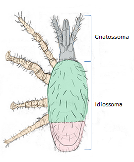 tagmose nos acaros